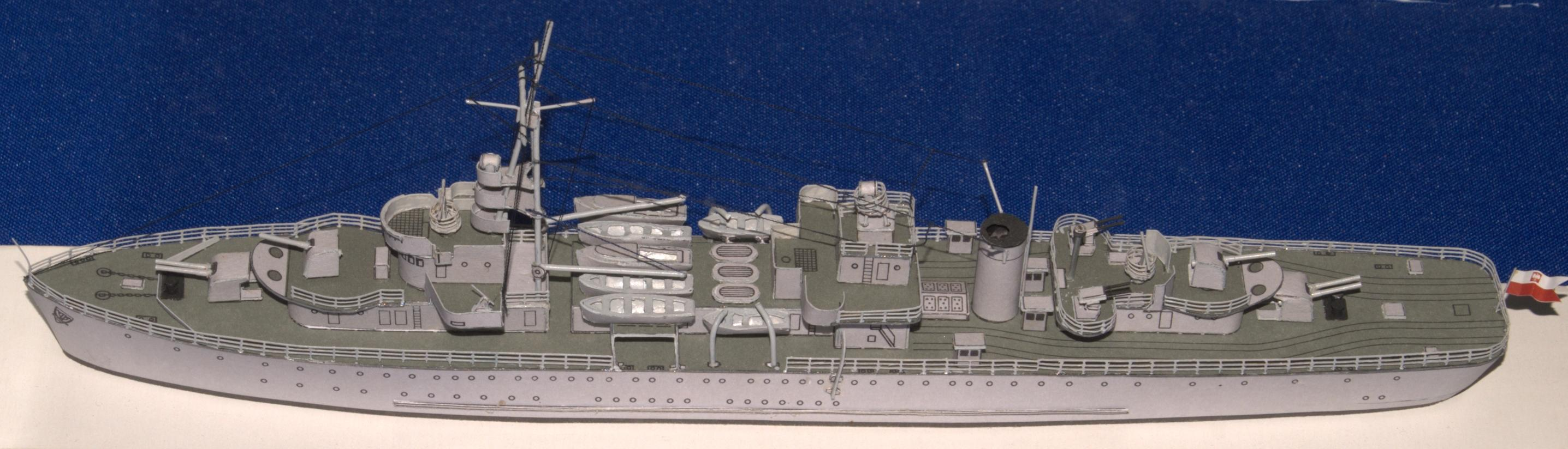 ORP Gryf (1938) Model: skala 1:400 wykonał Michał Zabłocki z Gdańska wystawa na Darze Pomorza w dniach 28.06.-27.08.2010r.}